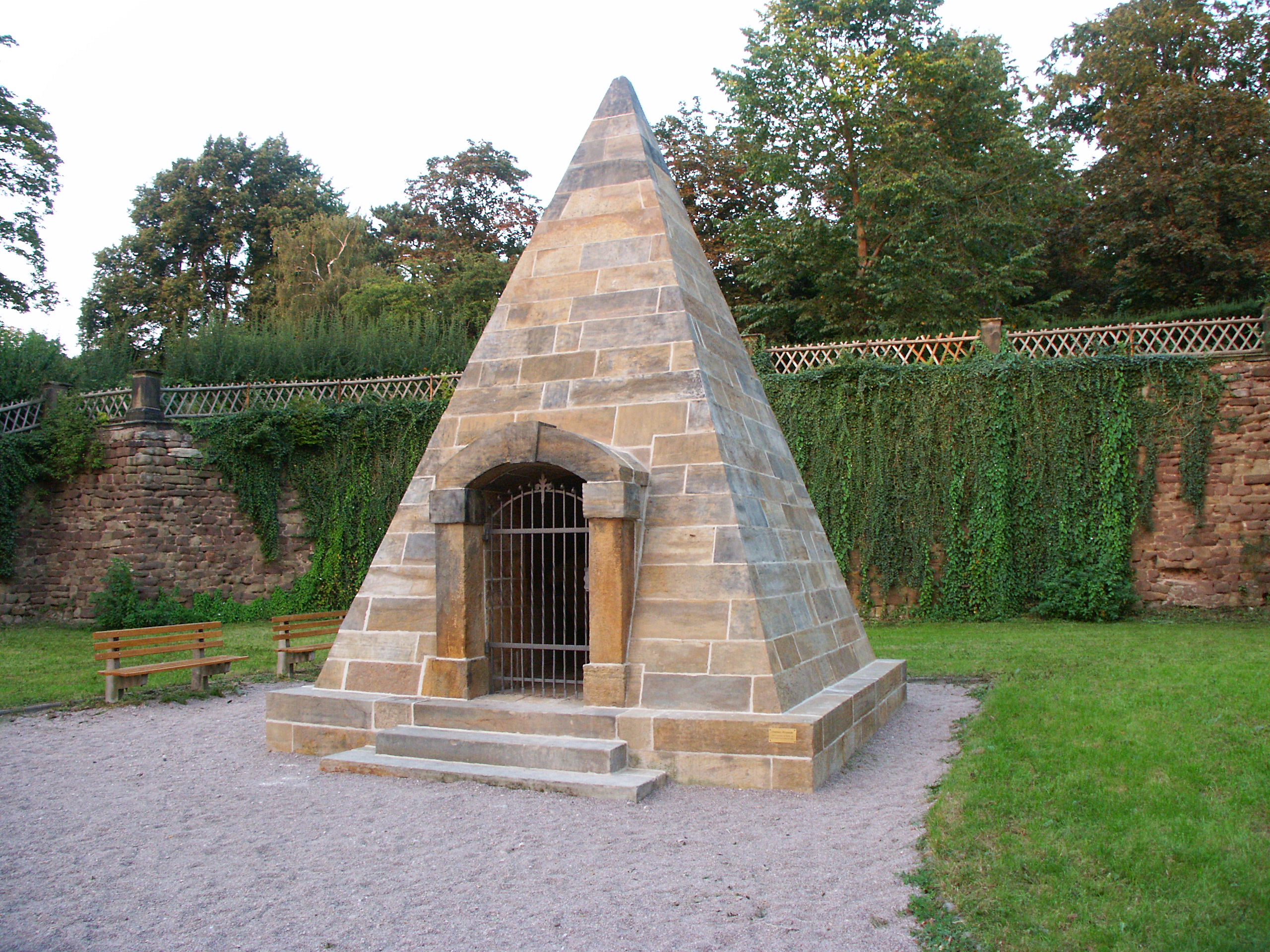 Studnitz-Pyramide in Gotha